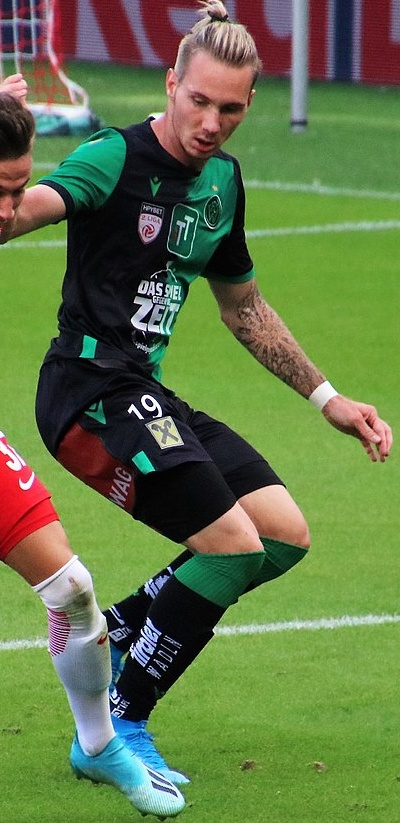 Thomas Kofler